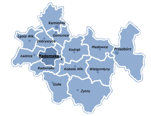 Mapa powiatu radomszczańskiego z podziałem na gminy.